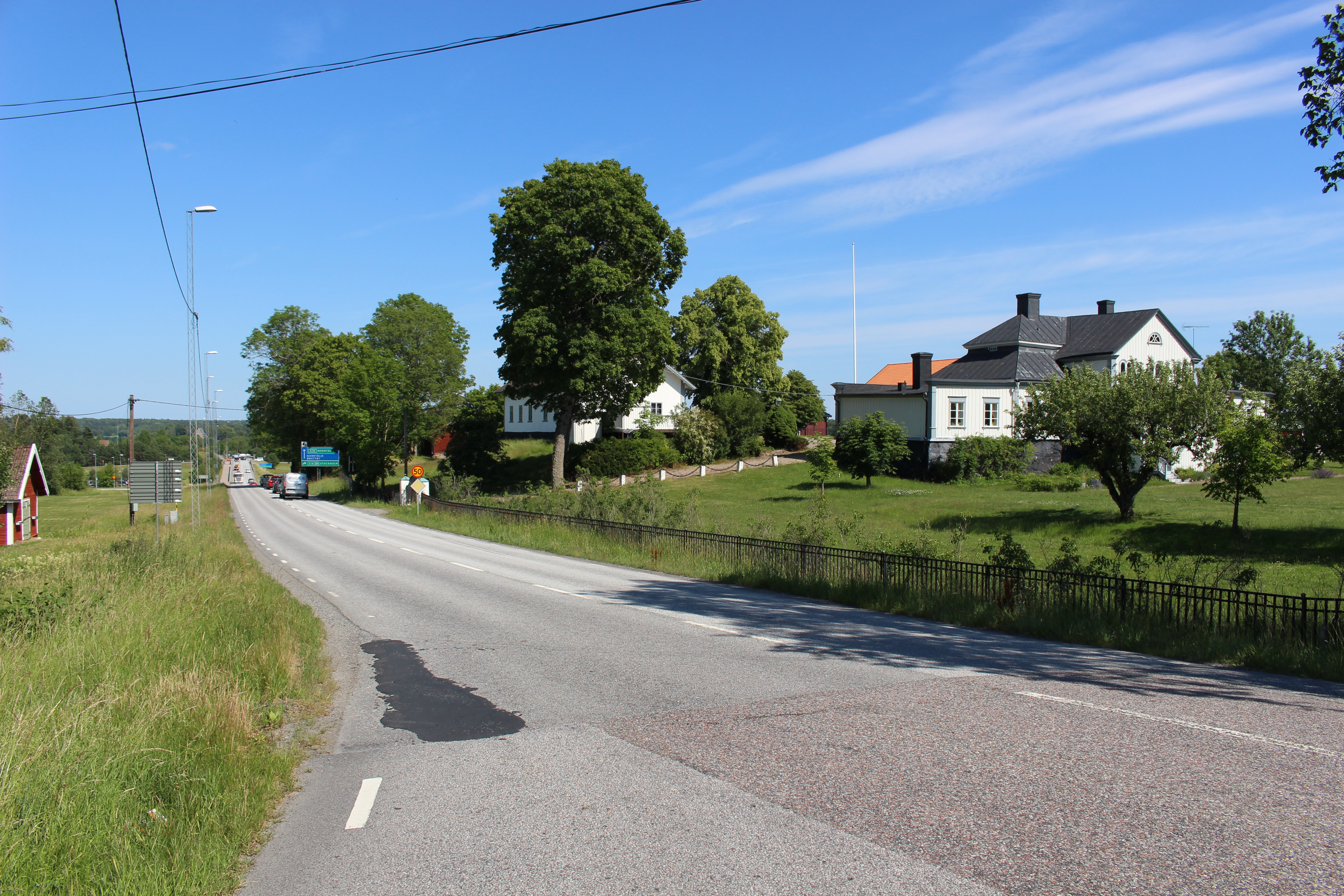 Länsväg 268 i Karby. Vy åt öster.